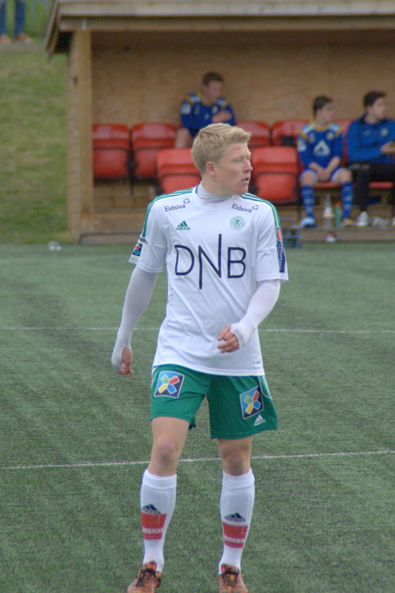 Kristian Eriksen for Hamarkameratene